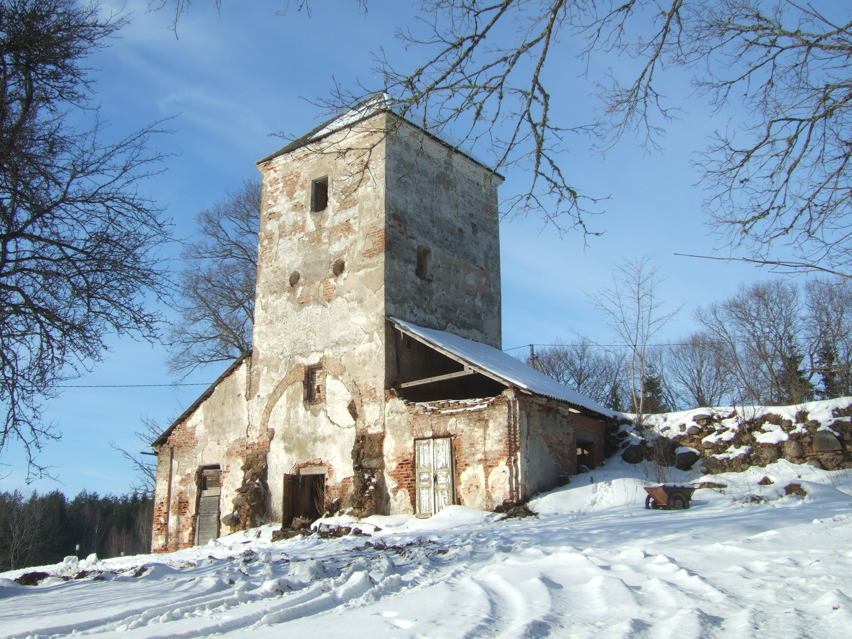 Norviliškių palivarko sodybos statinių komplekso vartų bokštas